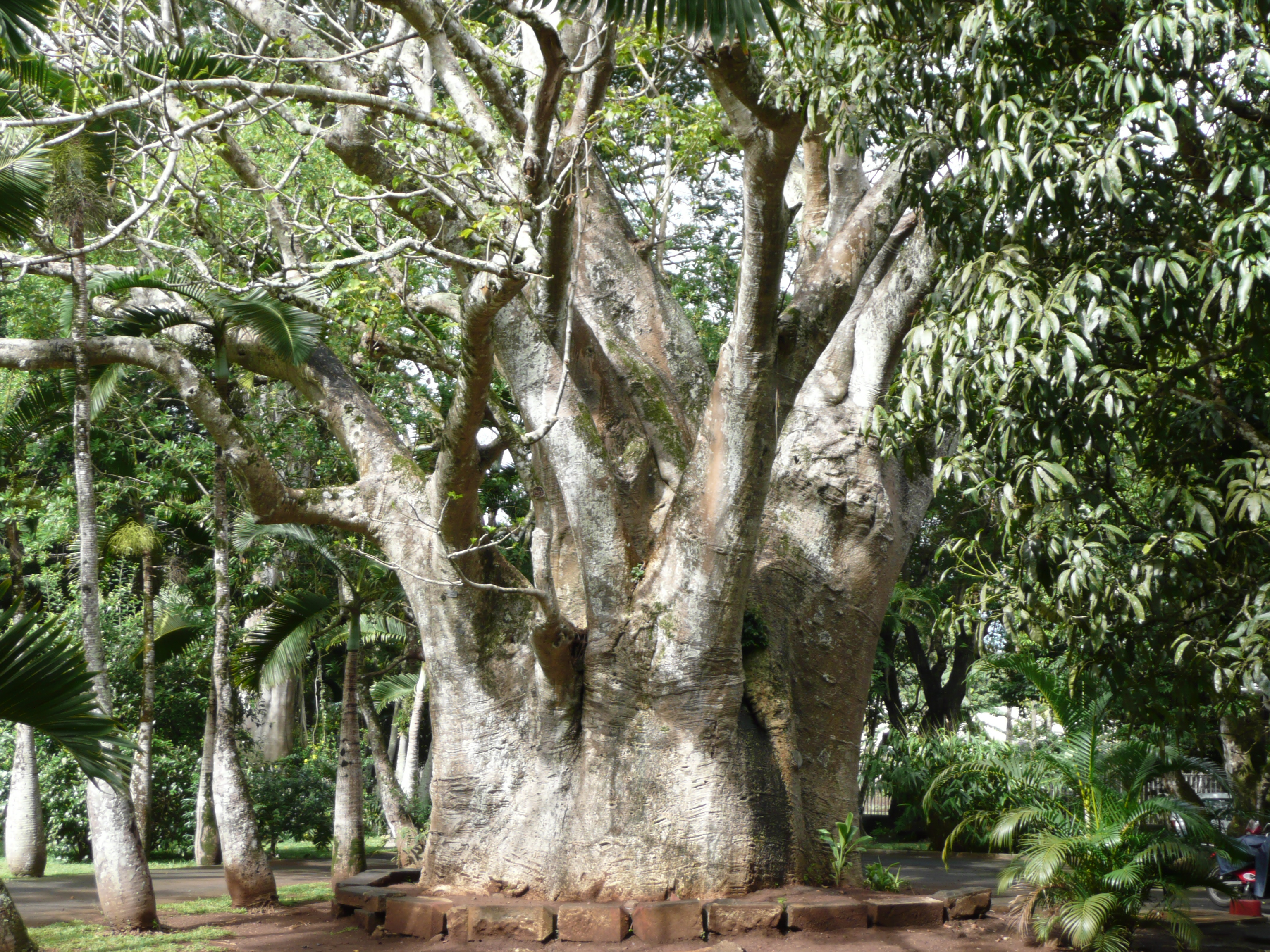 Adansonia digitata in Sir Seewoosagur Ramgoolam Botanical Garden Map: 20° 6' 25" S 57° 34' 46" E